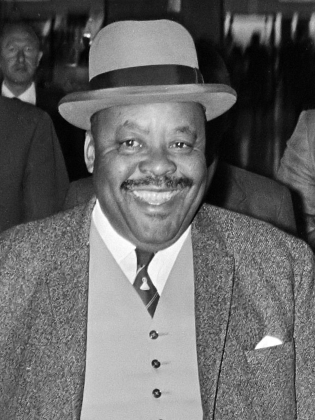 Minister-president Jonathan van Lesotho arriveert op Schiphol 4 november 1970